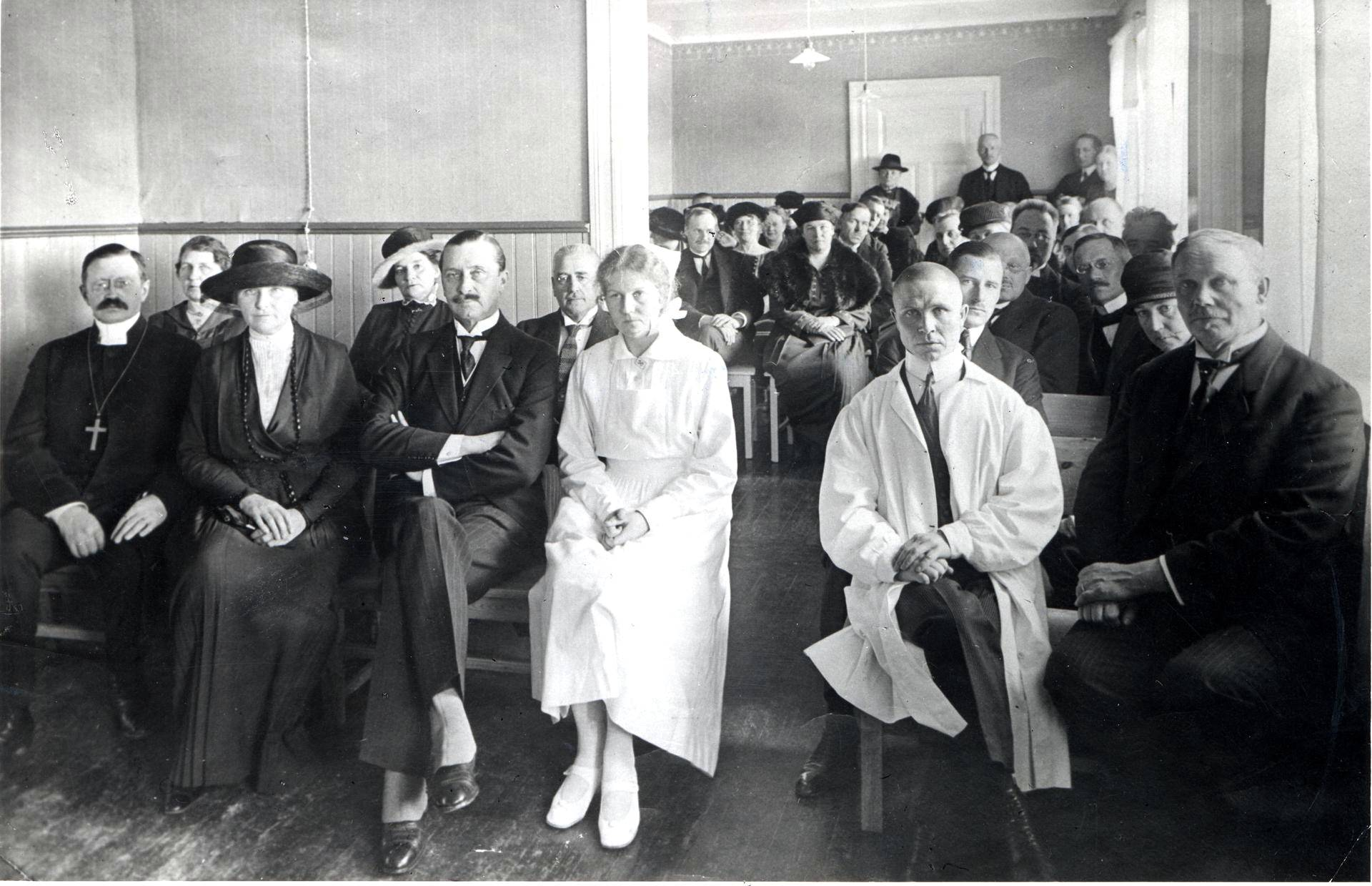 Kallion Lastenlinna vihitään uudelleen käyttöön. Eturivissä piispa Jaakko Gummerus, ylihoitaja Sophie Mannerheim, kenraali Carl Gustaf Emil Mannerheim, ylihoitaja Toini Leikola, professori Arvo Ylppö, jonka takana kouluneuvos Erik Mandelin.